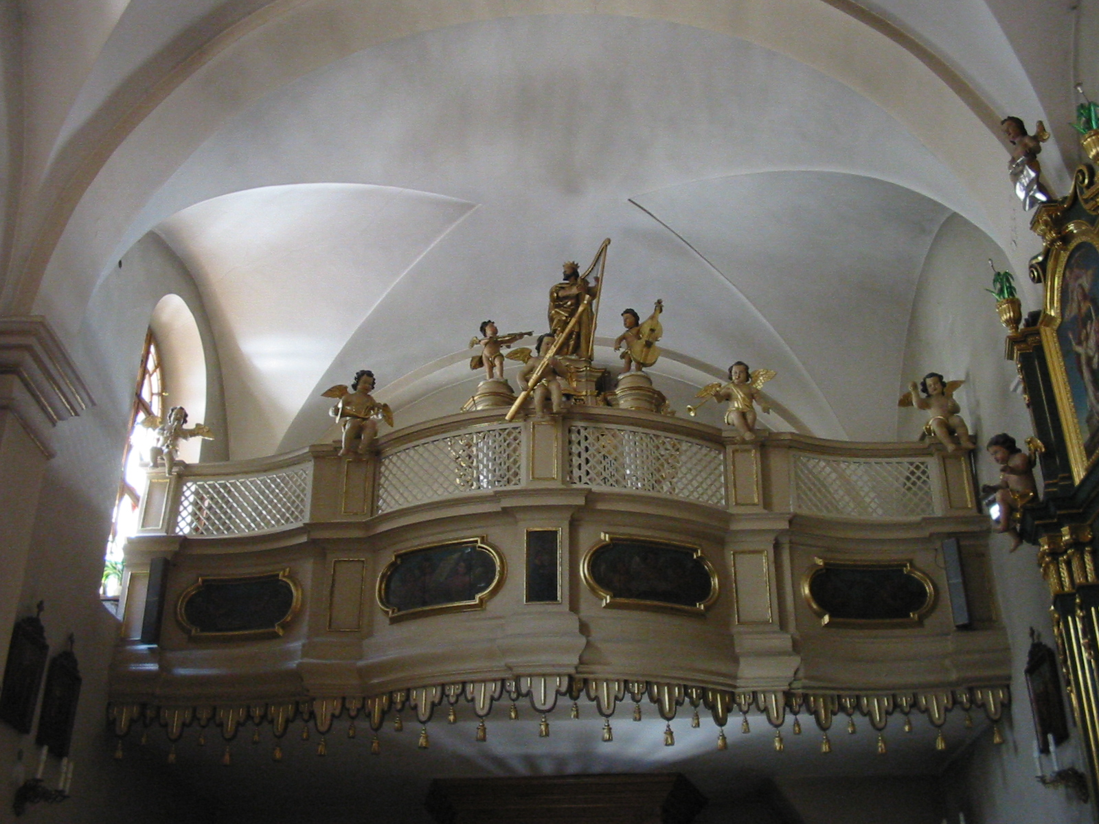 Zdjęcie Prospektu organów w kościele ŚŚ. Jana Chrzciciela i Jana Ewangelisty w Krakowie